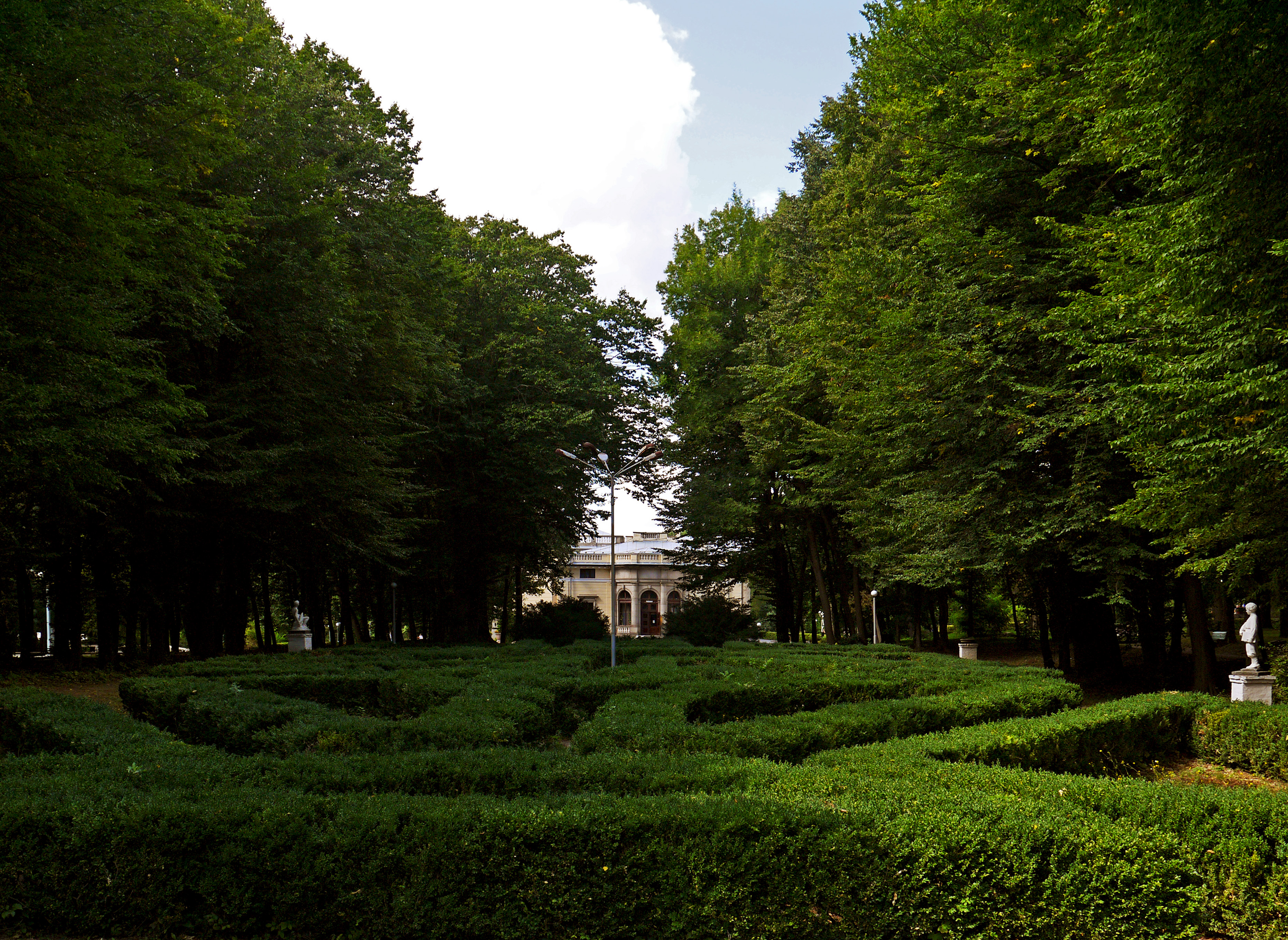 Немирівський парк, Немирівський район, м. Немирів, вул. Шевченка, 1